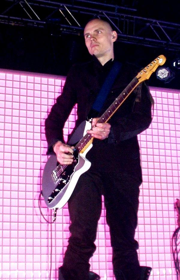 Corgan John Jr, Konzert Live Music Hall Köln, 11. Jun. 2005